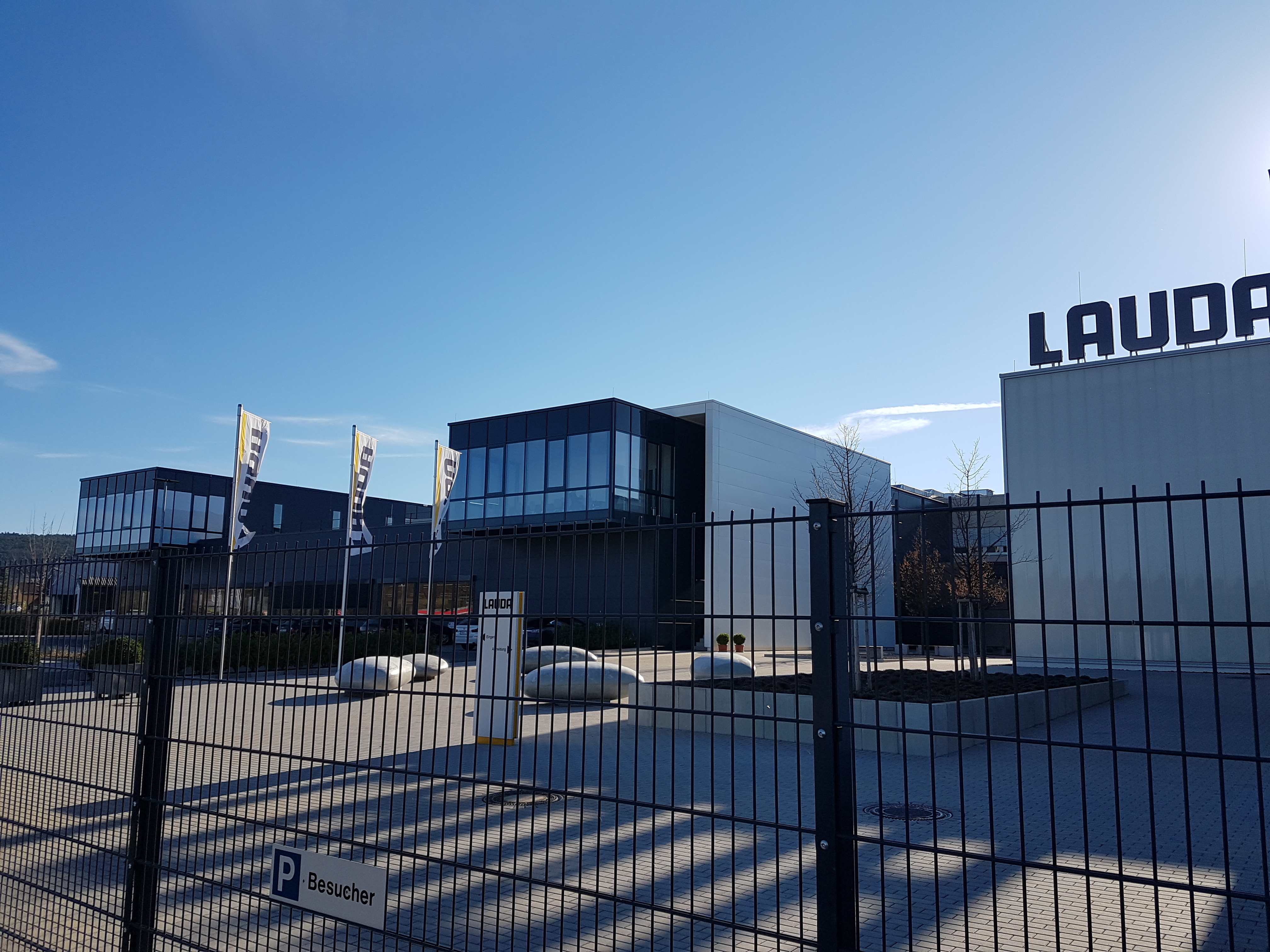 Lauda Dr. R. Wobser GmbH & Co. KG